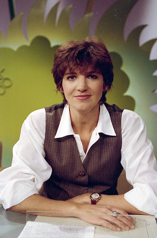 Martine van Os